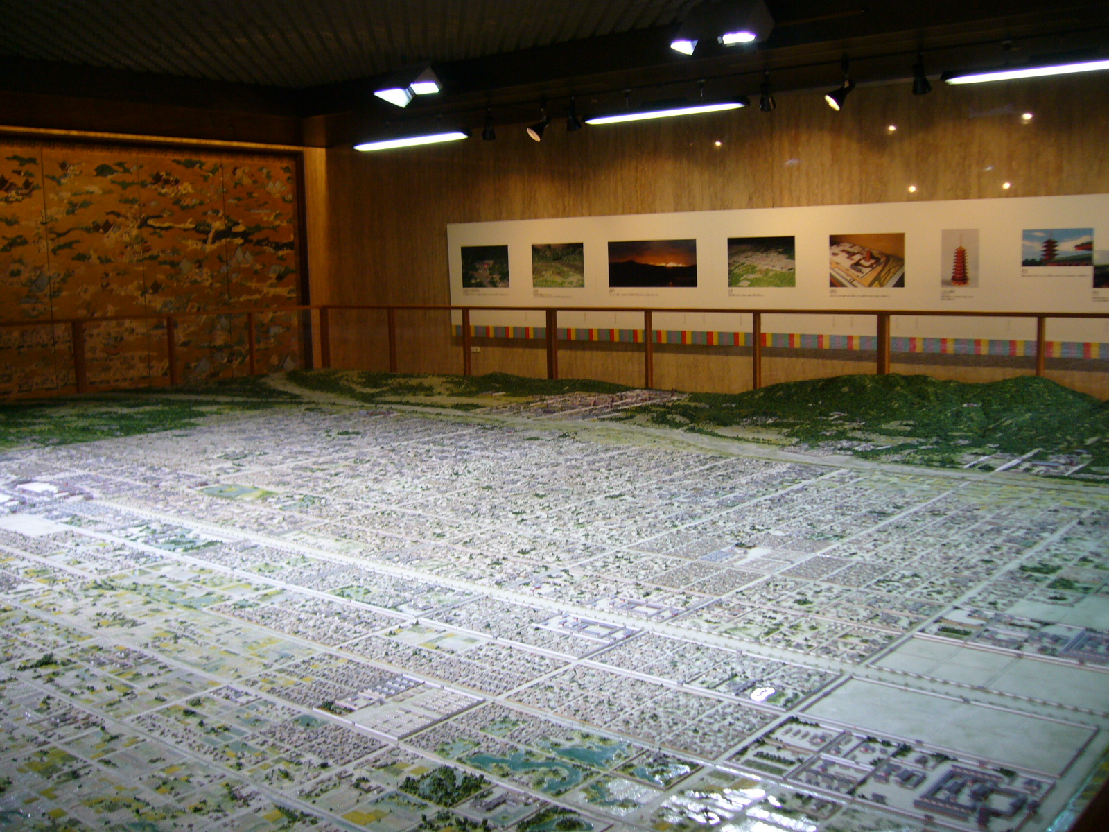 Heiankyouhukugenmokei